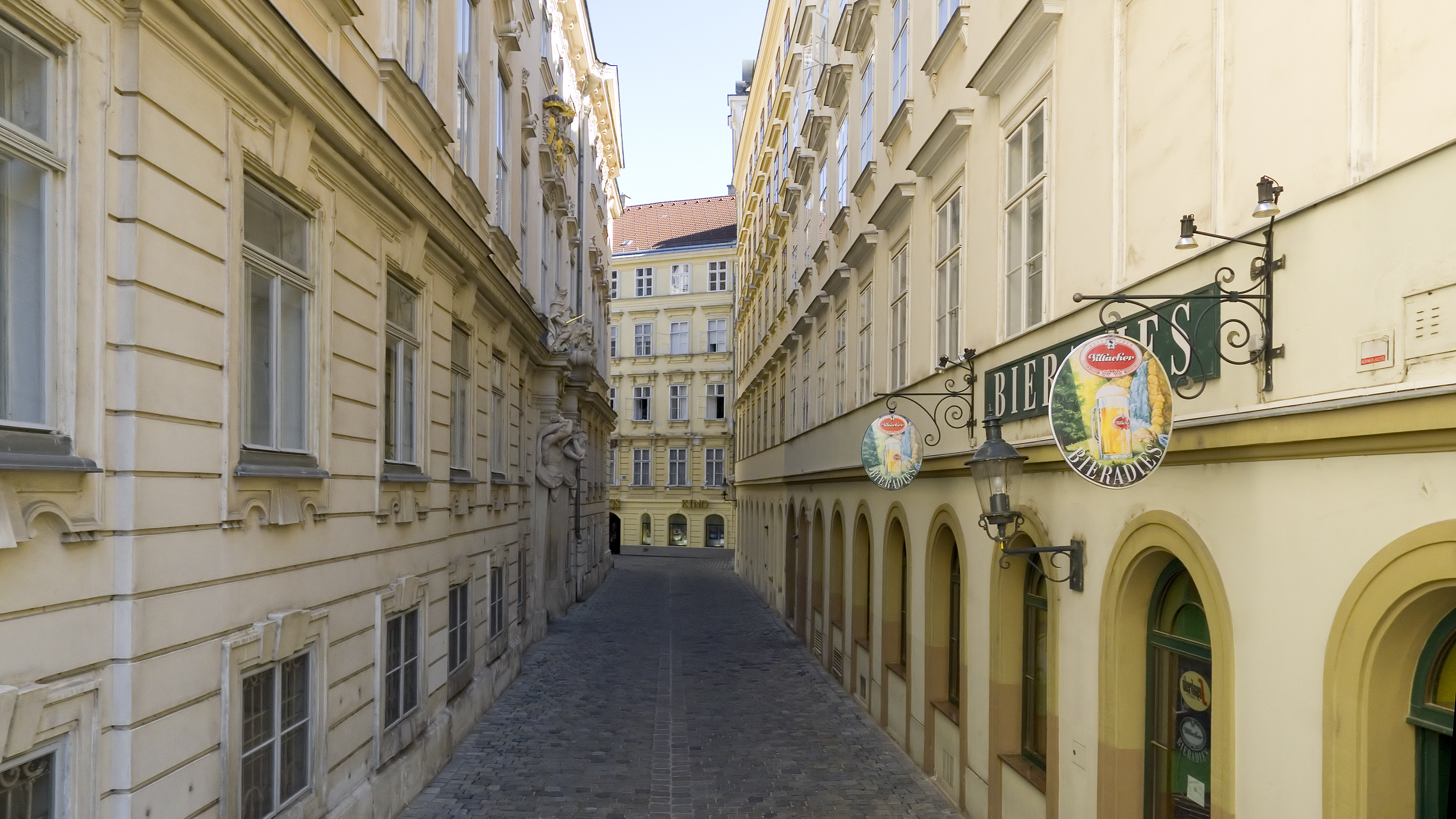 Jordangasse in Wien 1 bei Nr. 9 Richtung Südosten